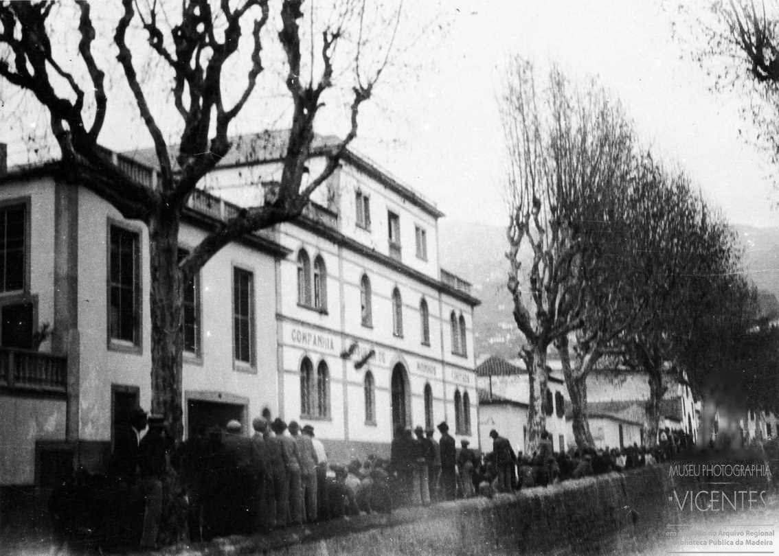 Reprodução de uma fotografia do movimento popular "Revolta da Farinha", junto à Companhia Insular de Moinhos, Freguesia da Sé, Concelho do Funchal